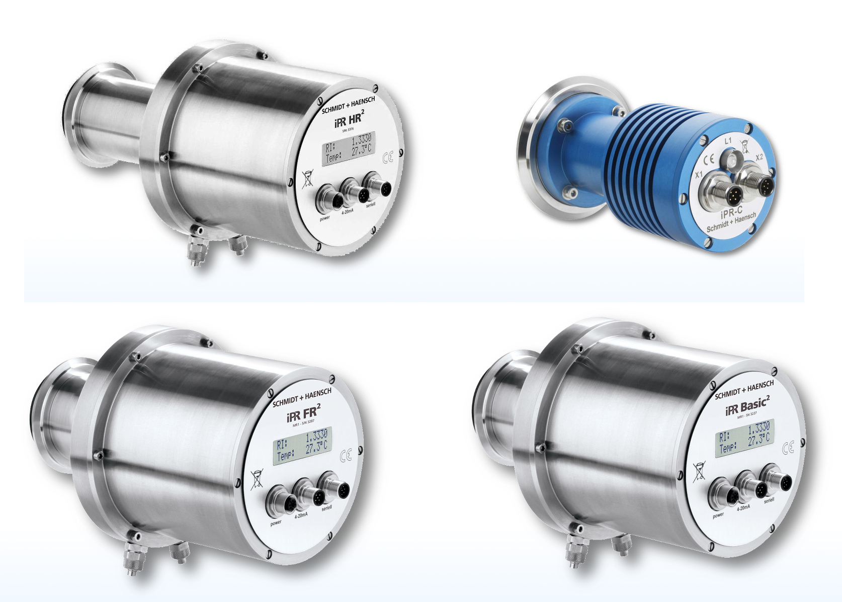 Prozessrefraktometer iPR Familie Schmidt + Haensch